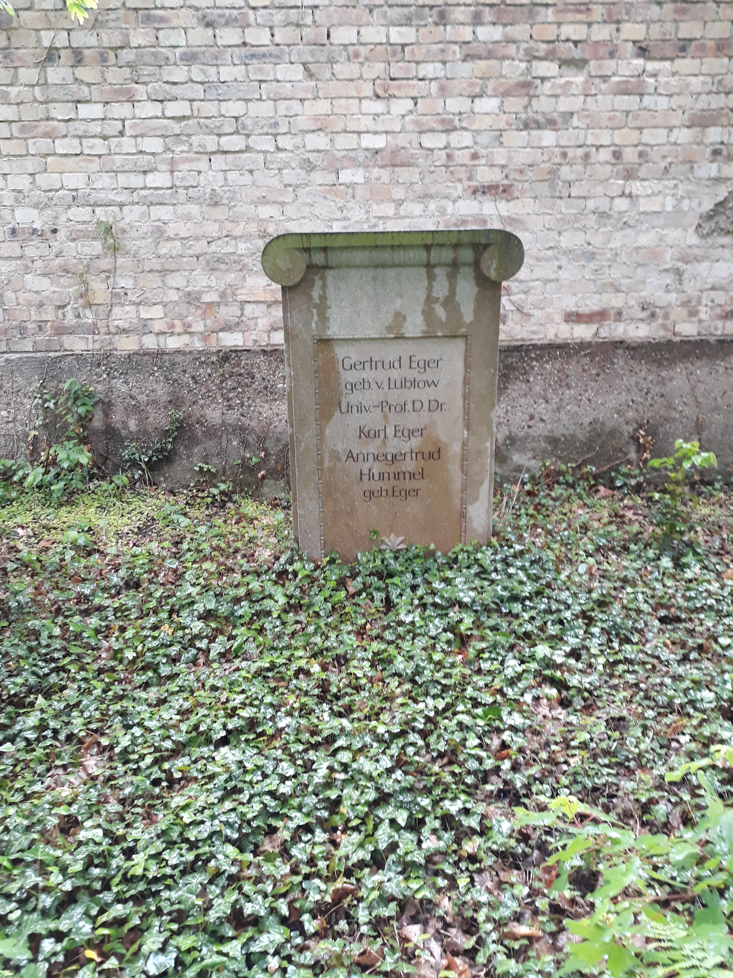 Grabstätte des deutschen evangelischen Theologen Karl Eger auf dem Gertraudenfriedhof Halle (Saale). Der Grabstein wurde erneuert.